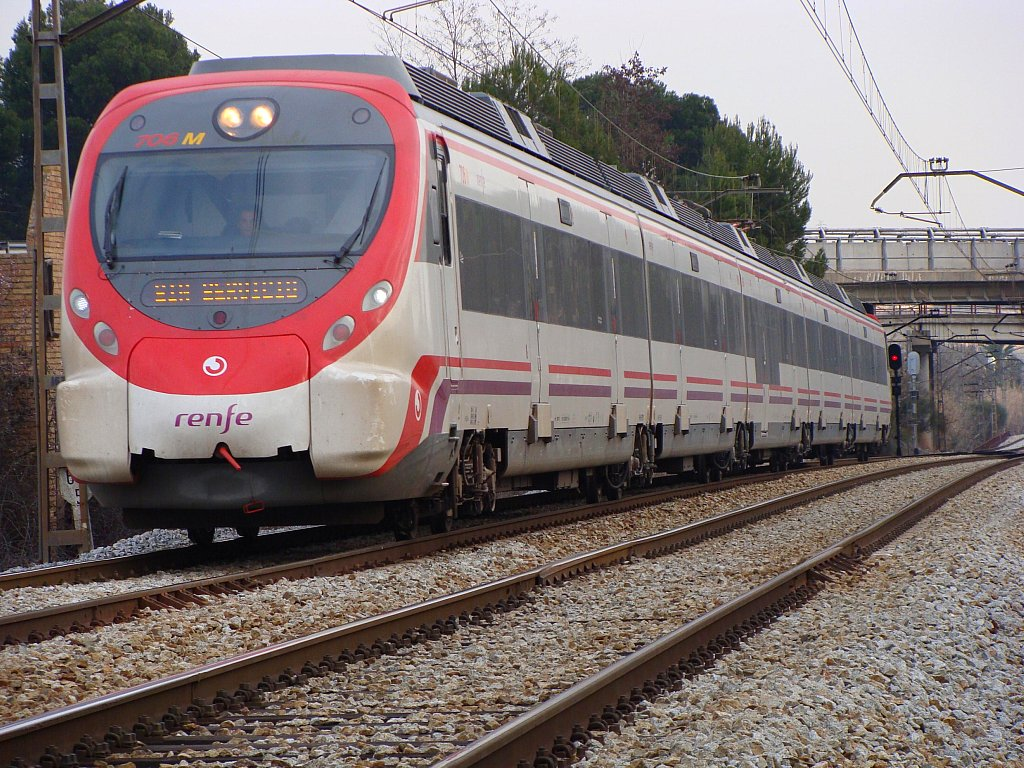 Tren Civia 465 en probes al seu pas per Gelida en direcció San Vicenç de Calders. Tren Civia 465 en pruebas a su paso por Gelida en dirección San Vicenç de Calders.